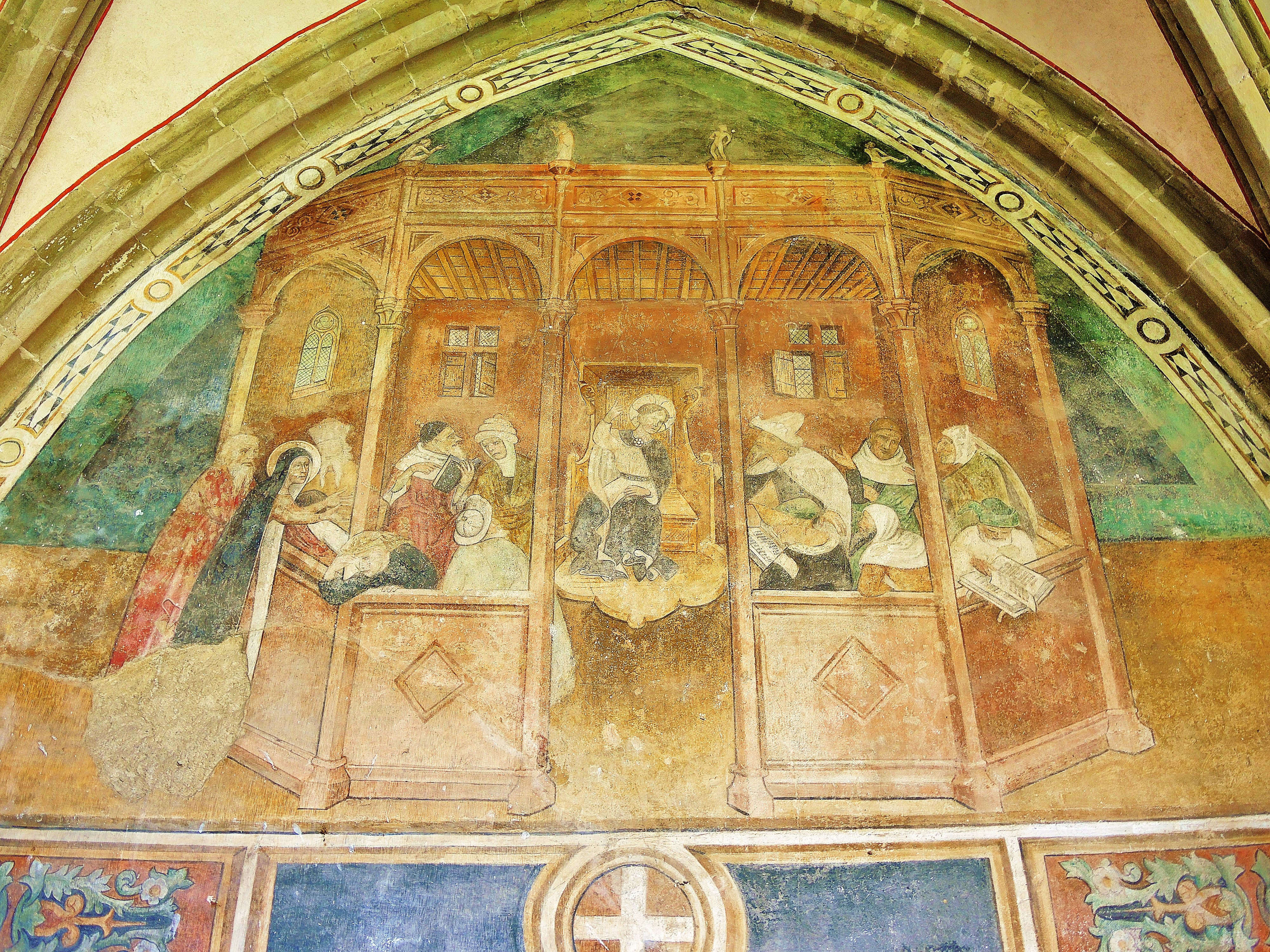 Une des peinture murale dans le cloître de l'ancienne abbaye d'Abondance.